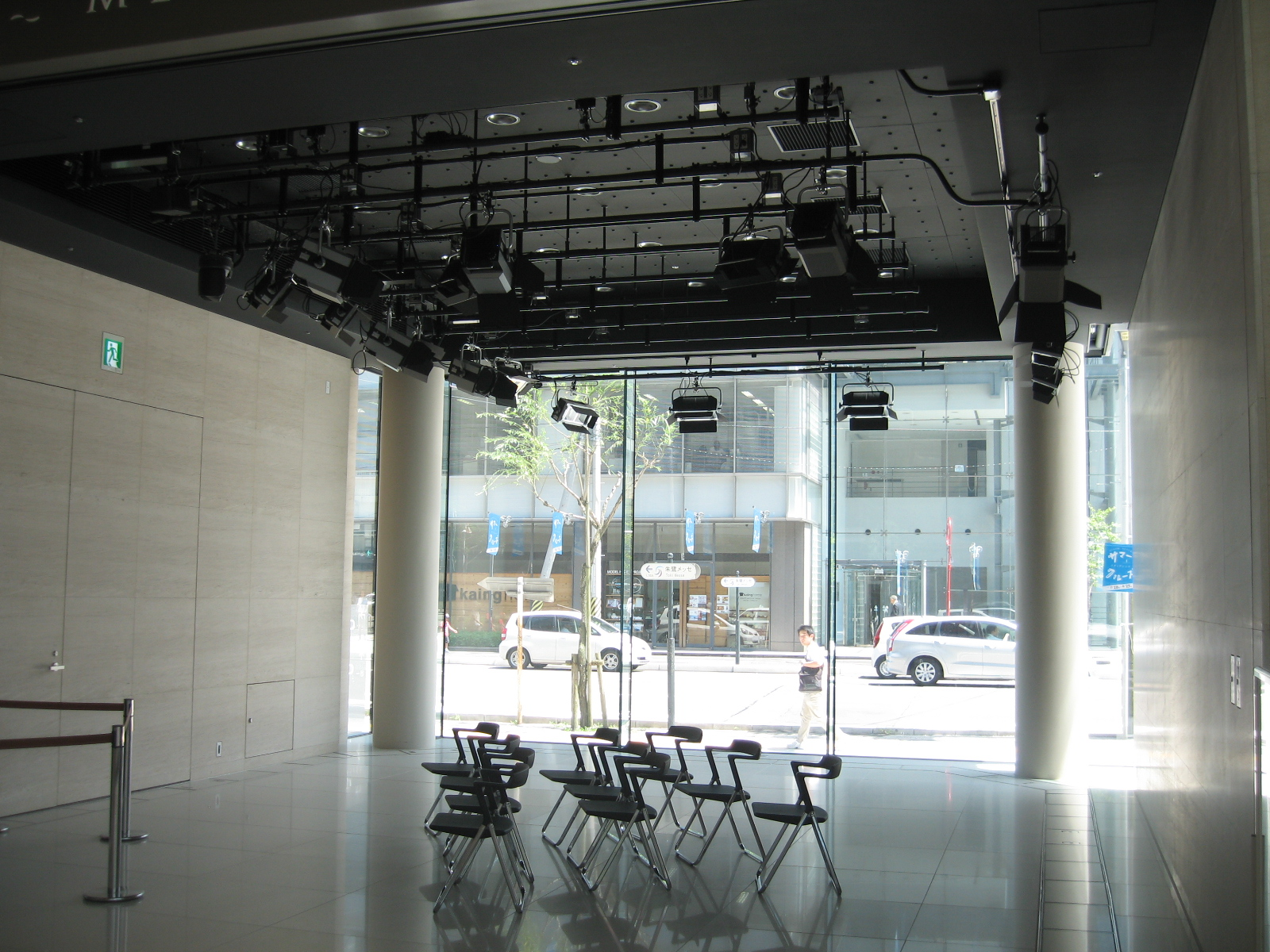 新潟市中央区。新潟日報メディアシップ1階のスタジオ。